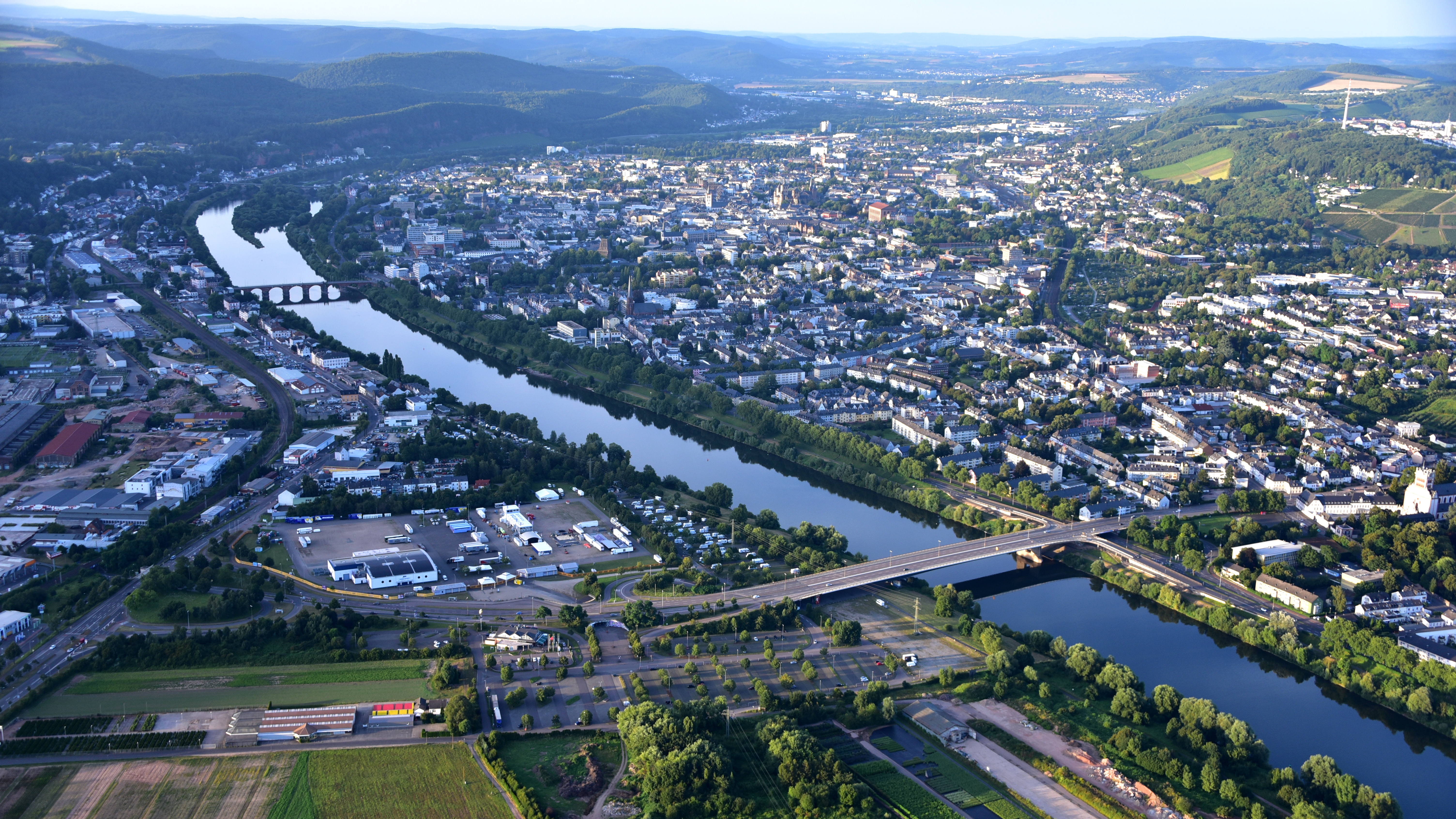 Trier, Luftaufnahme (2016)